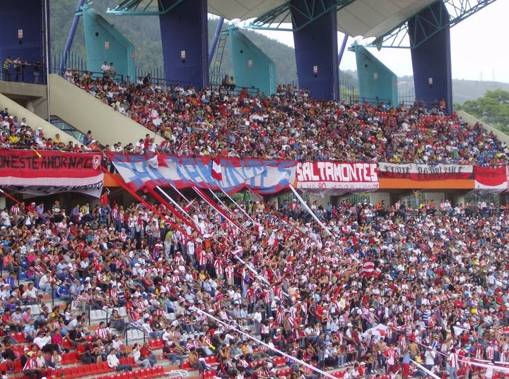 Hinchas de Estudiantes